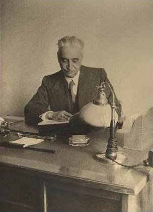 Felice Supino nel suo studio